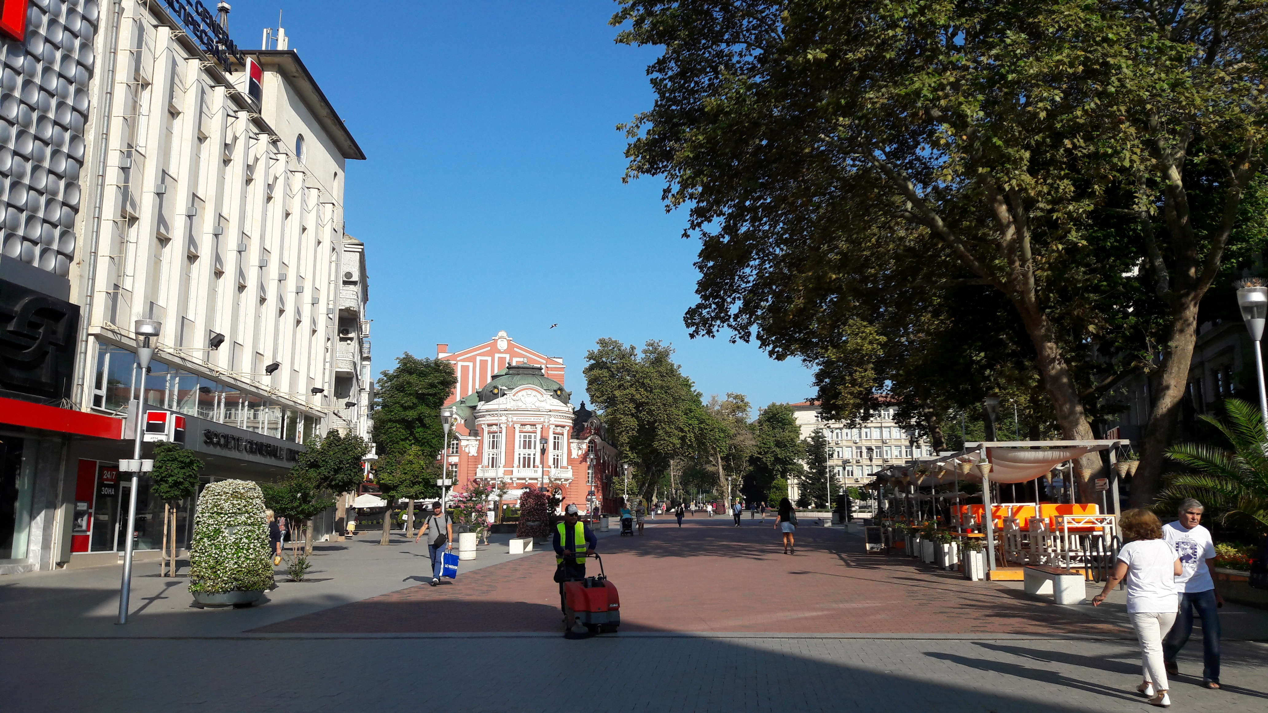 Sheshi i vjetër i Varnës